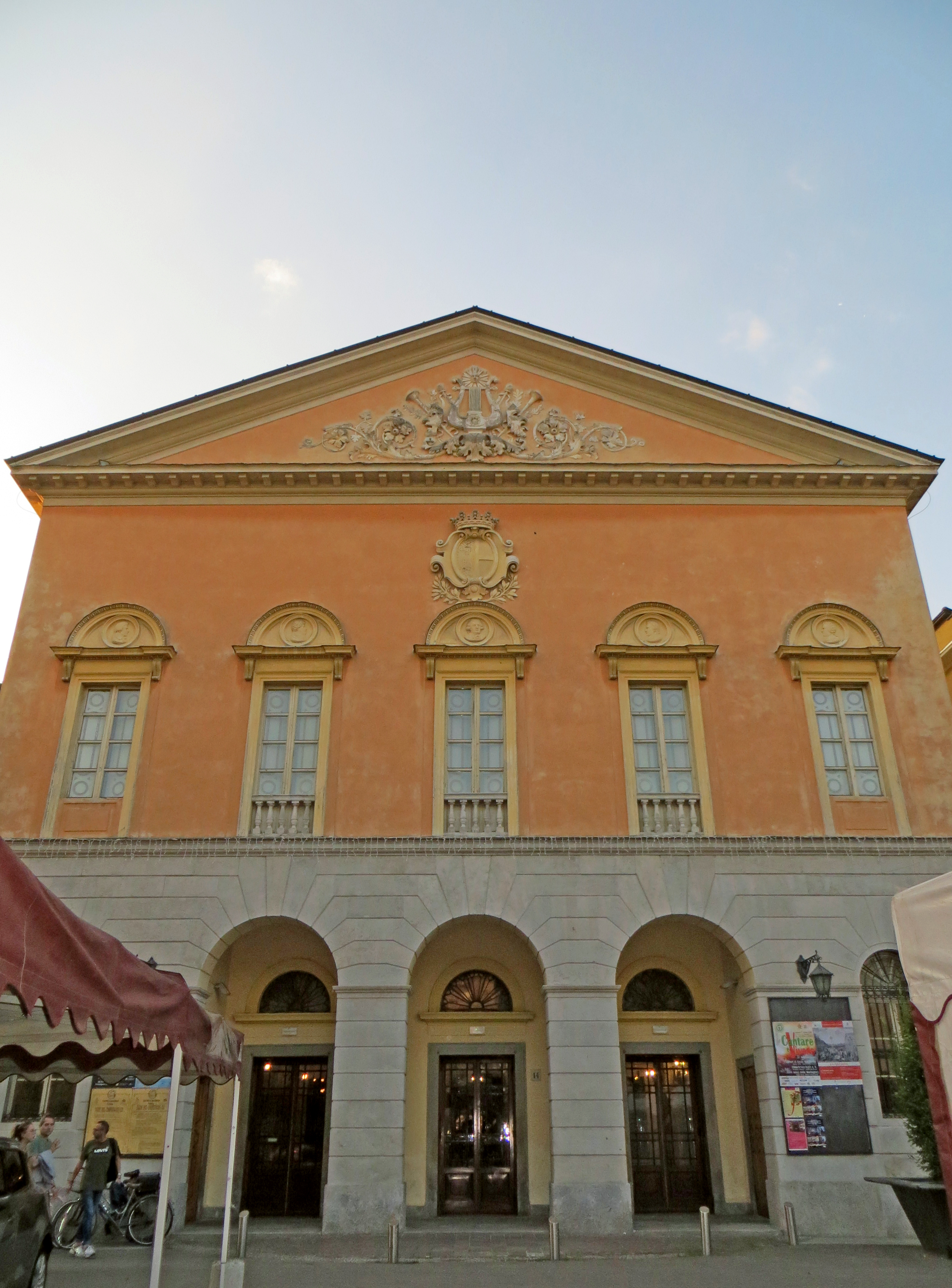 Teatro Girolamo Magnani (Fidenza) - facciata